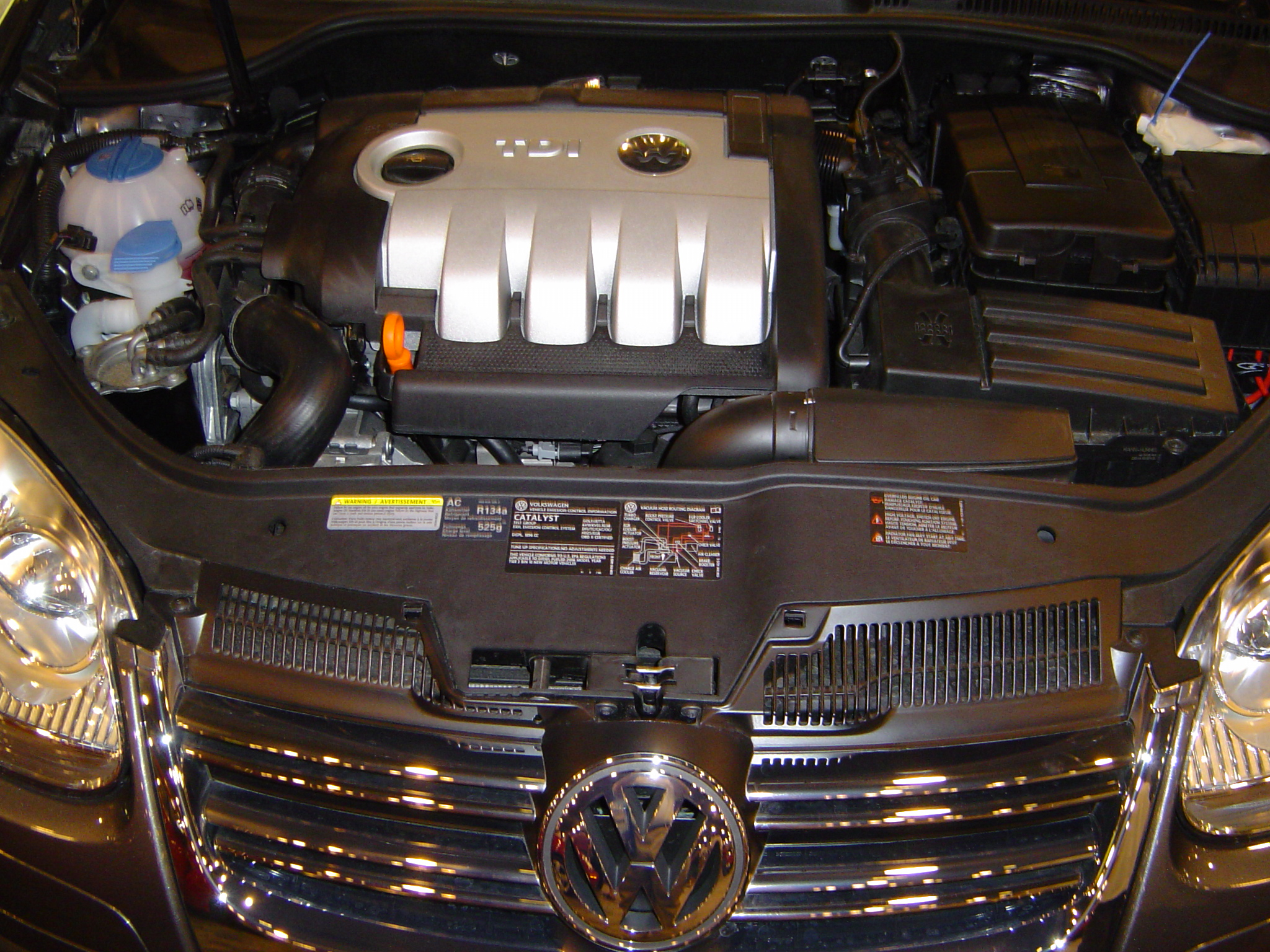 2,0 TDI motor i VW Jetta V, årgang 2005